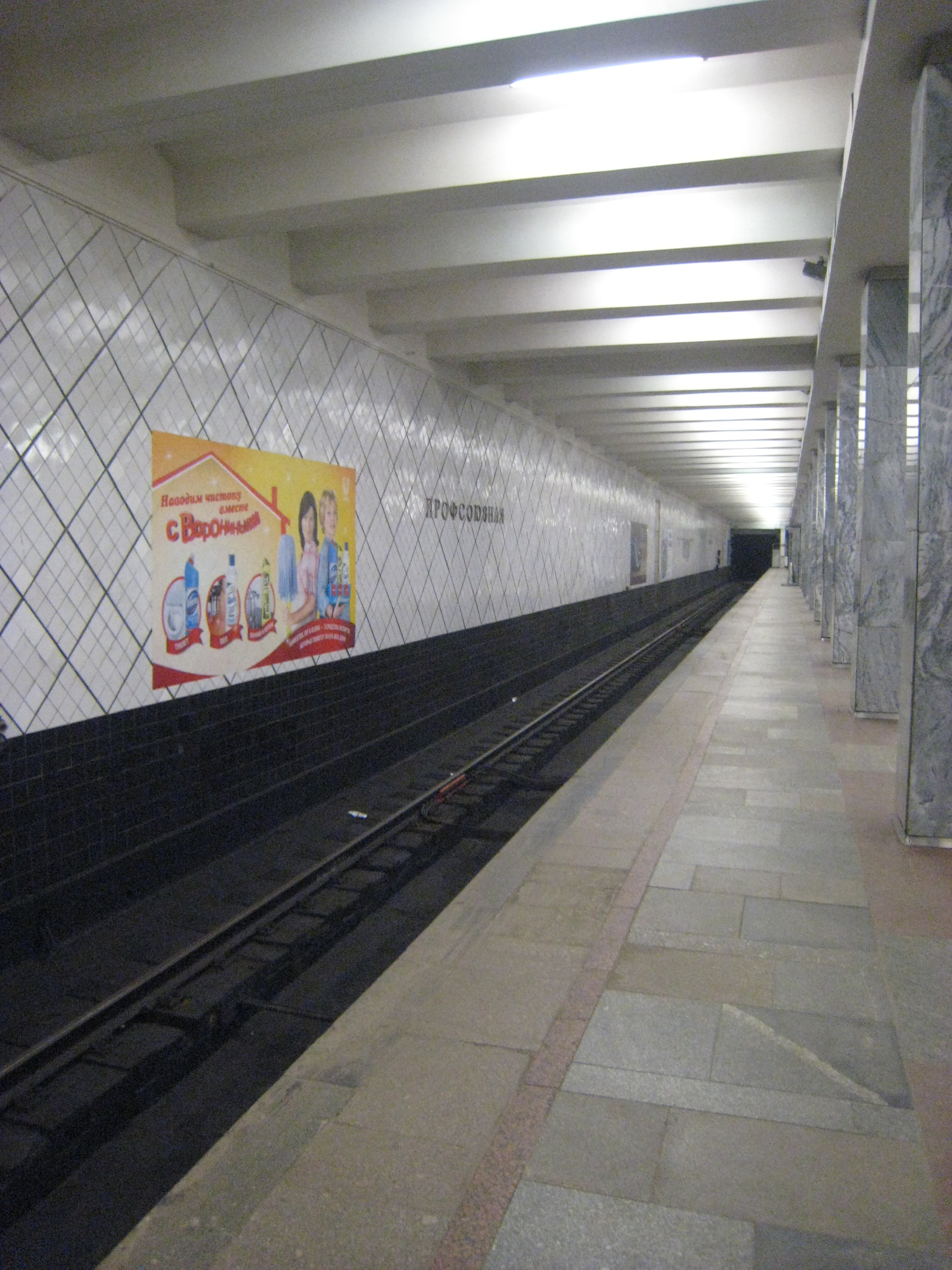 Москва, станция метро Профсоюзная.